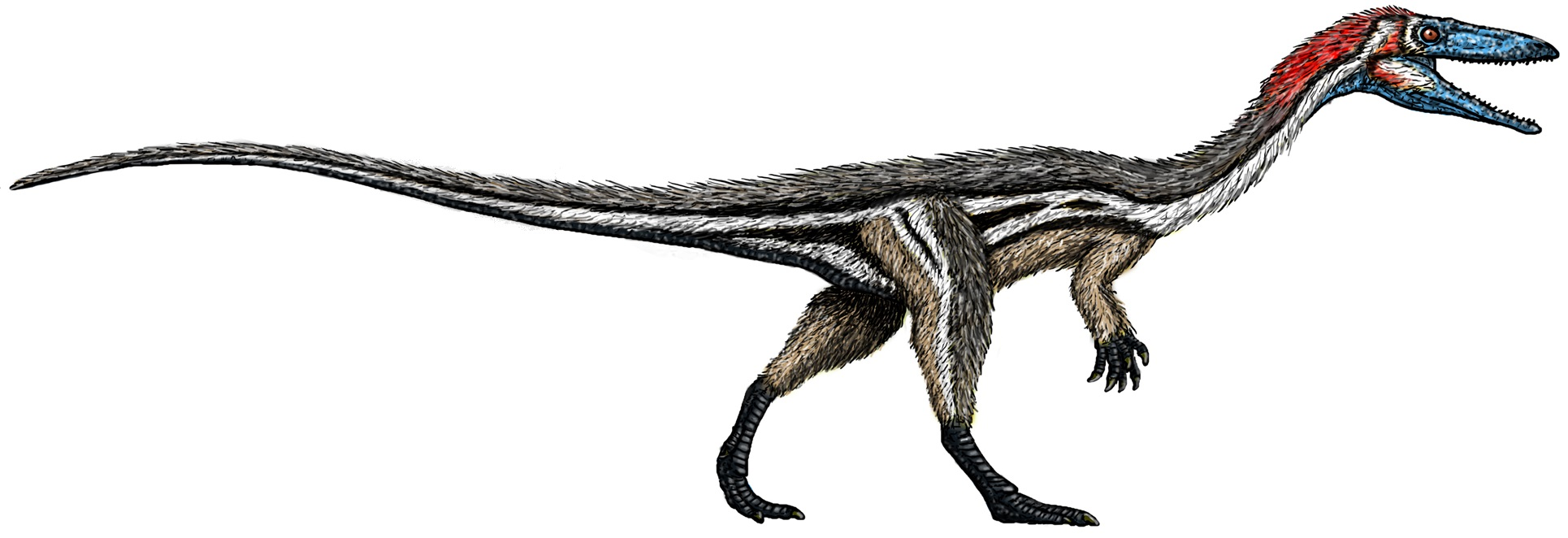 Credit Dr. Jeff Martz/NPS